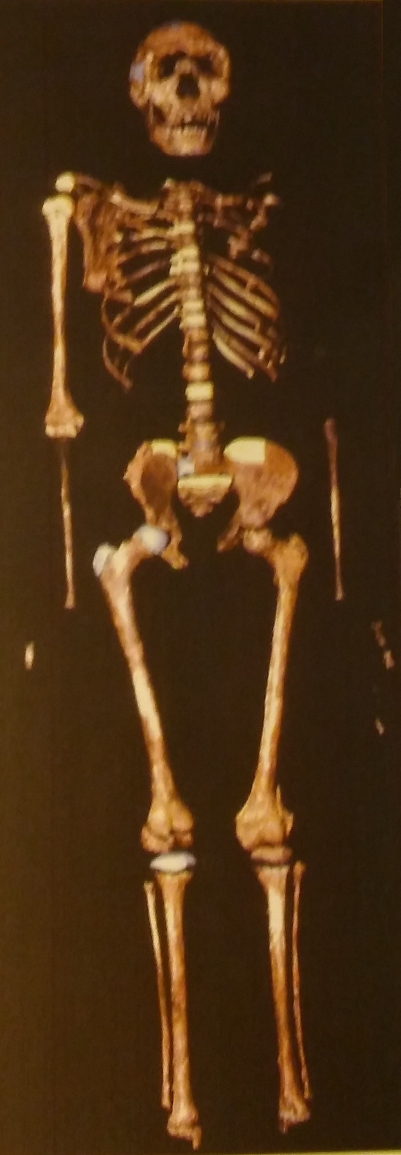 Kostra chlapce od jezera Turkana